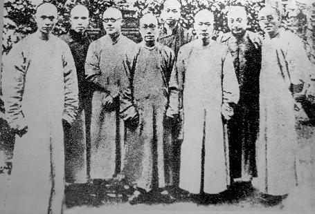 时务学堂教师合影